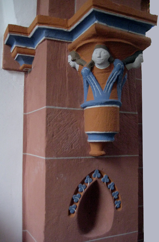 Kapitell Kirche Geiß-Nidda